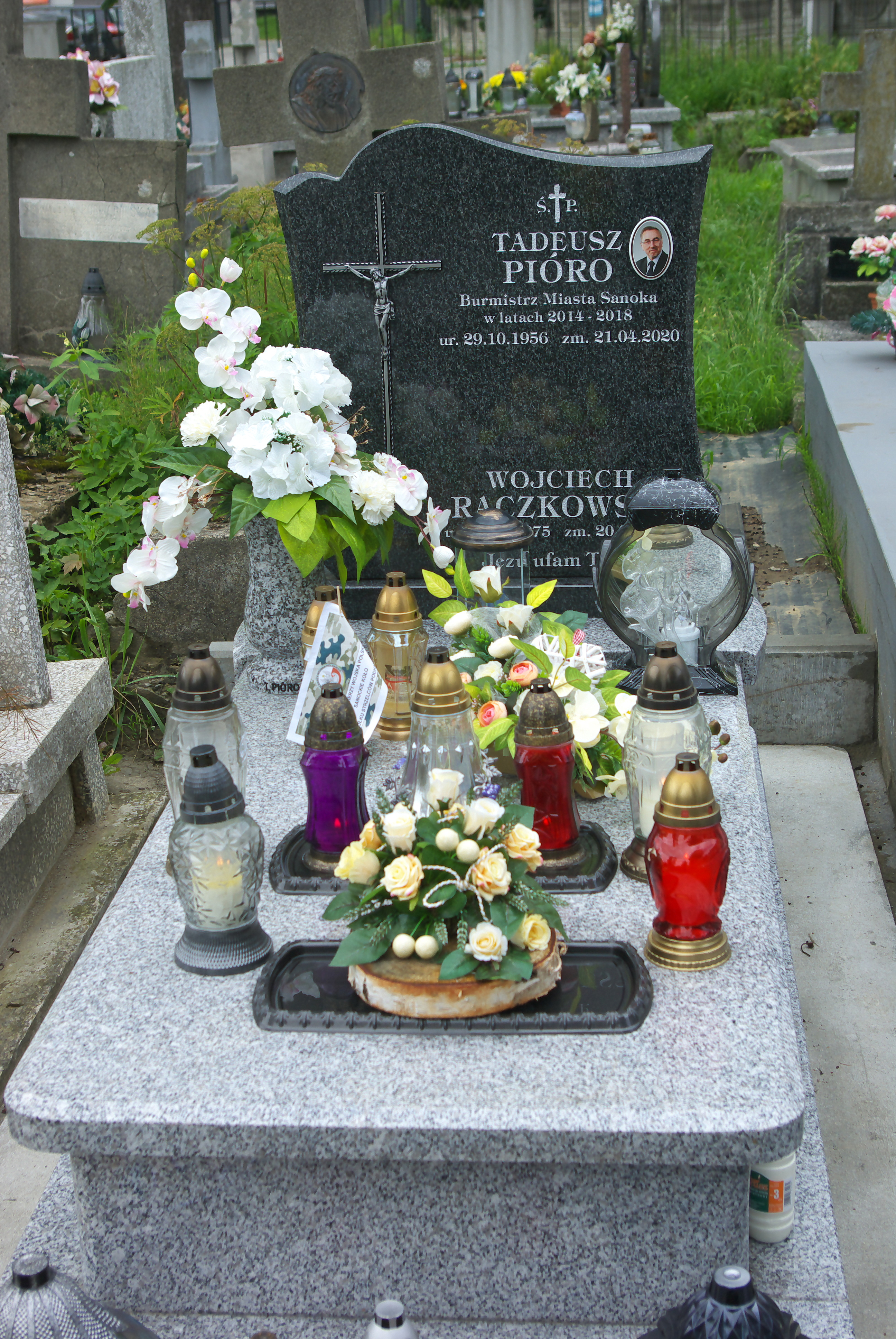 Nagrobek Tadeusza Pióry na Cmentarzu Centralnym w Sanoku.